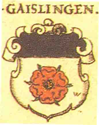 Johann Siebmacher: New Wappenbuch / Geislingen an der Steige eingescannt aus: Horst Appuhn (Hrsg.), Johann Siebmachers Wappenbuch. Die bibliophilen Taschenbücher 538, 2. verb. Aufl , Dortmund 1989 Städte Blatt 225